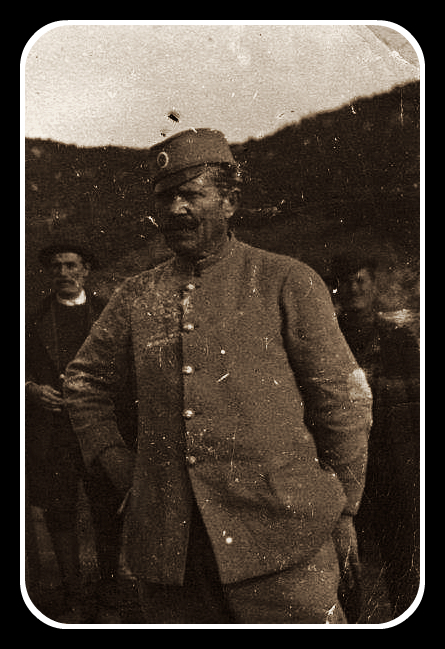 Војвода Цене на Солунскиот фронт